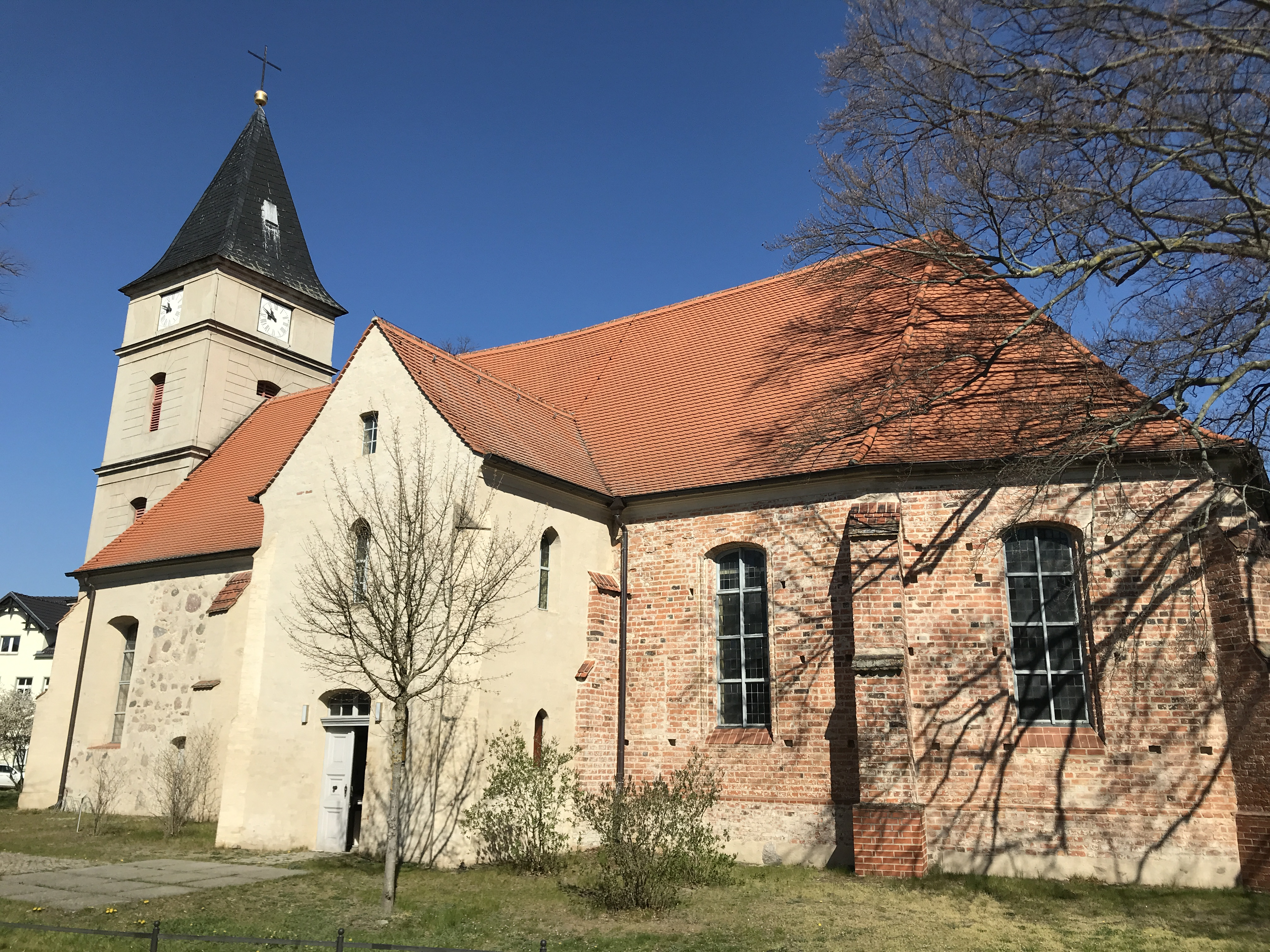 Die Stadtkirche St. Lambertus ist eine im Kern spätgotische Basilika, die nach einem Brand 1776 erneuert wurde. Die Kirchenausstattung stammt einheitlich aus dieser Zeit.